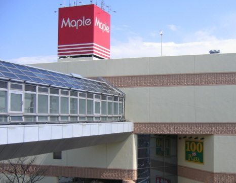 西館駐車場と結ぶ上空歩廊